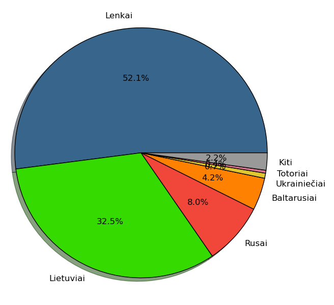 Vilniaus rajono tautybės pagal 2011 metų duomenis